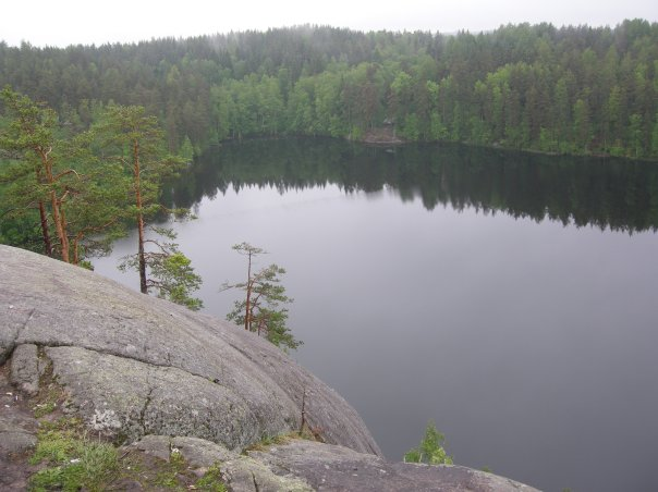 Lake Yastrebinoye